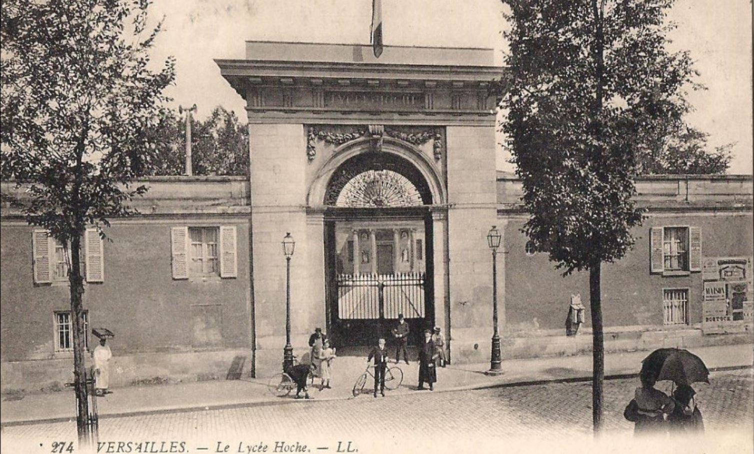 Carte postale du début du XXe siècle avec en photo l'entrée du lycée Hoche.